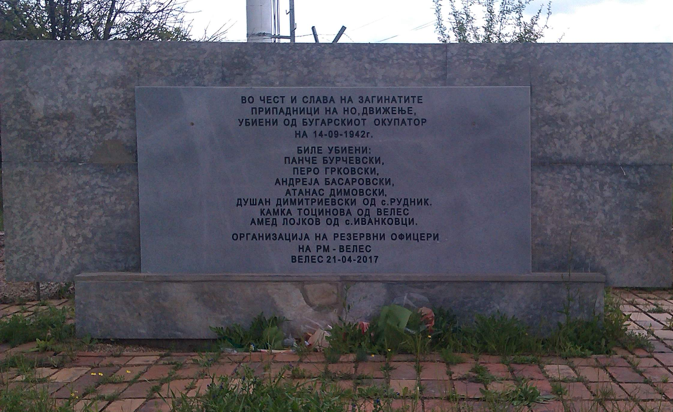 Спомен-плоча кај Пуста Кула, Велешко